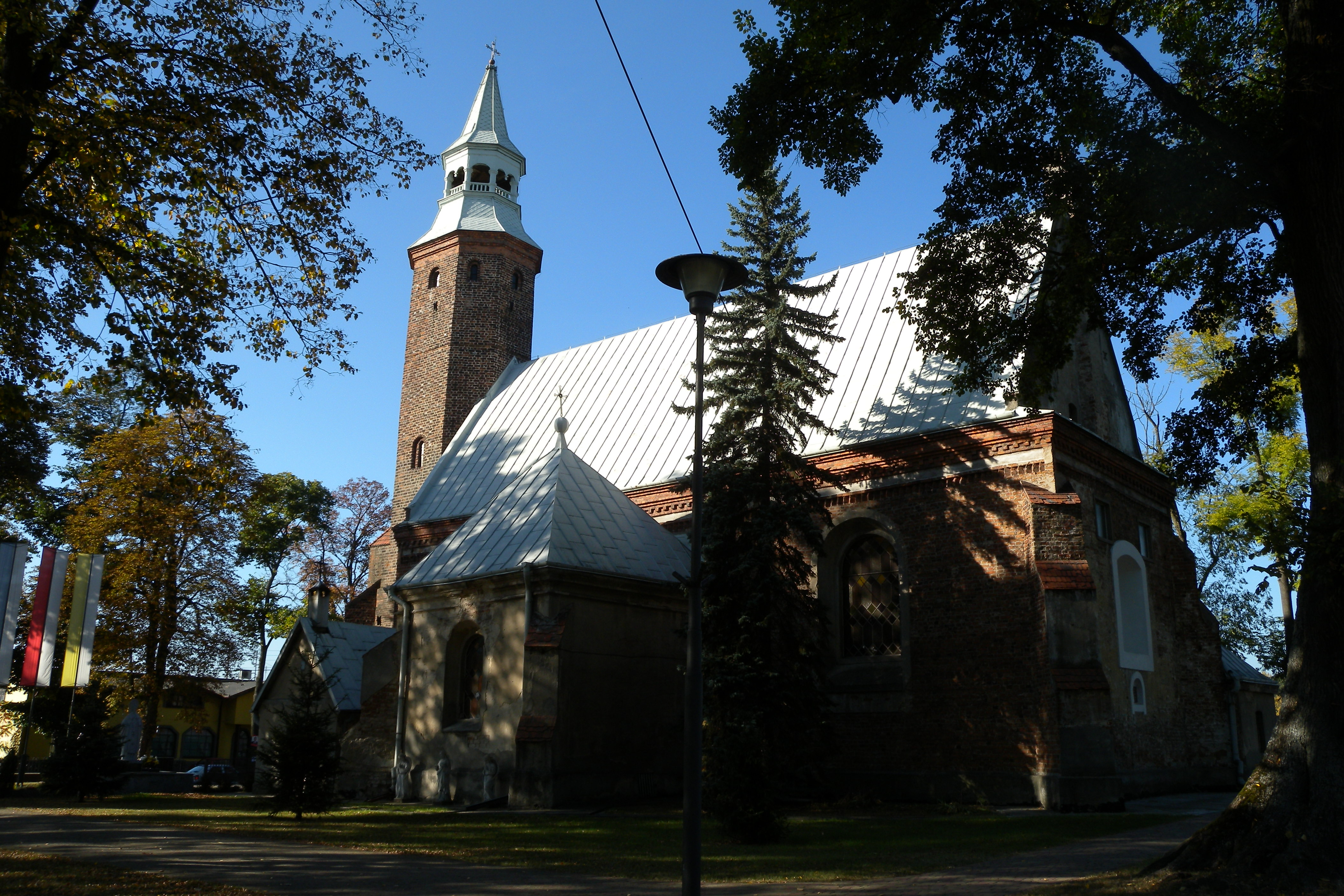 Buczek Kościół pw. św. Jana Chrzciciela